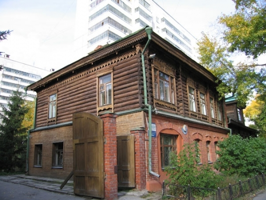 Здание, в котором находится Музей Счастья - памятник истории начала ХХ века